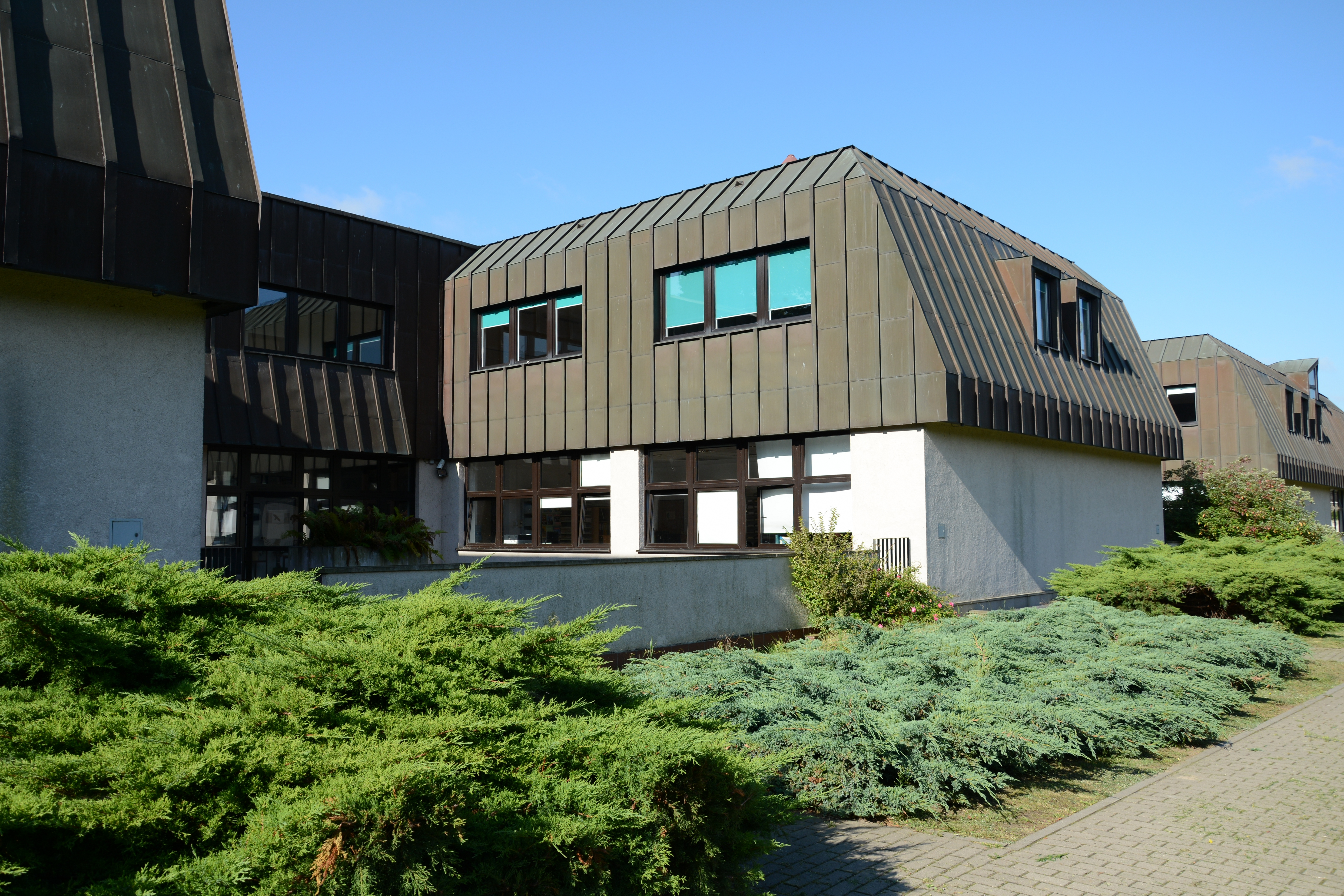 Budynek, w którym mieści się Biblioteka